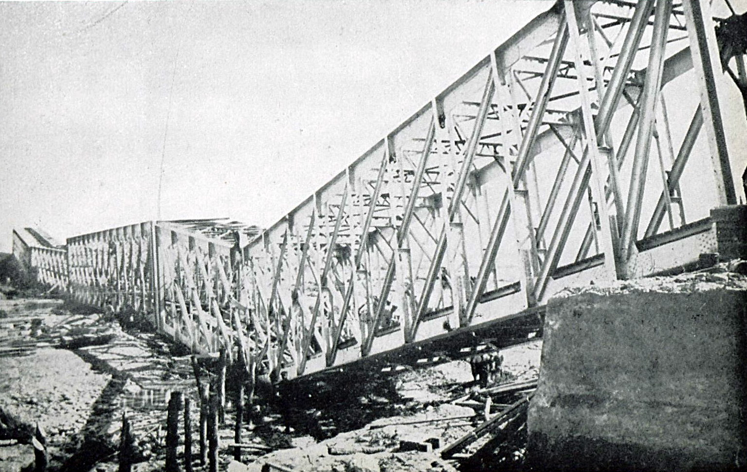 1916 - Album foto - Vrancea - pod distrus la Faurei